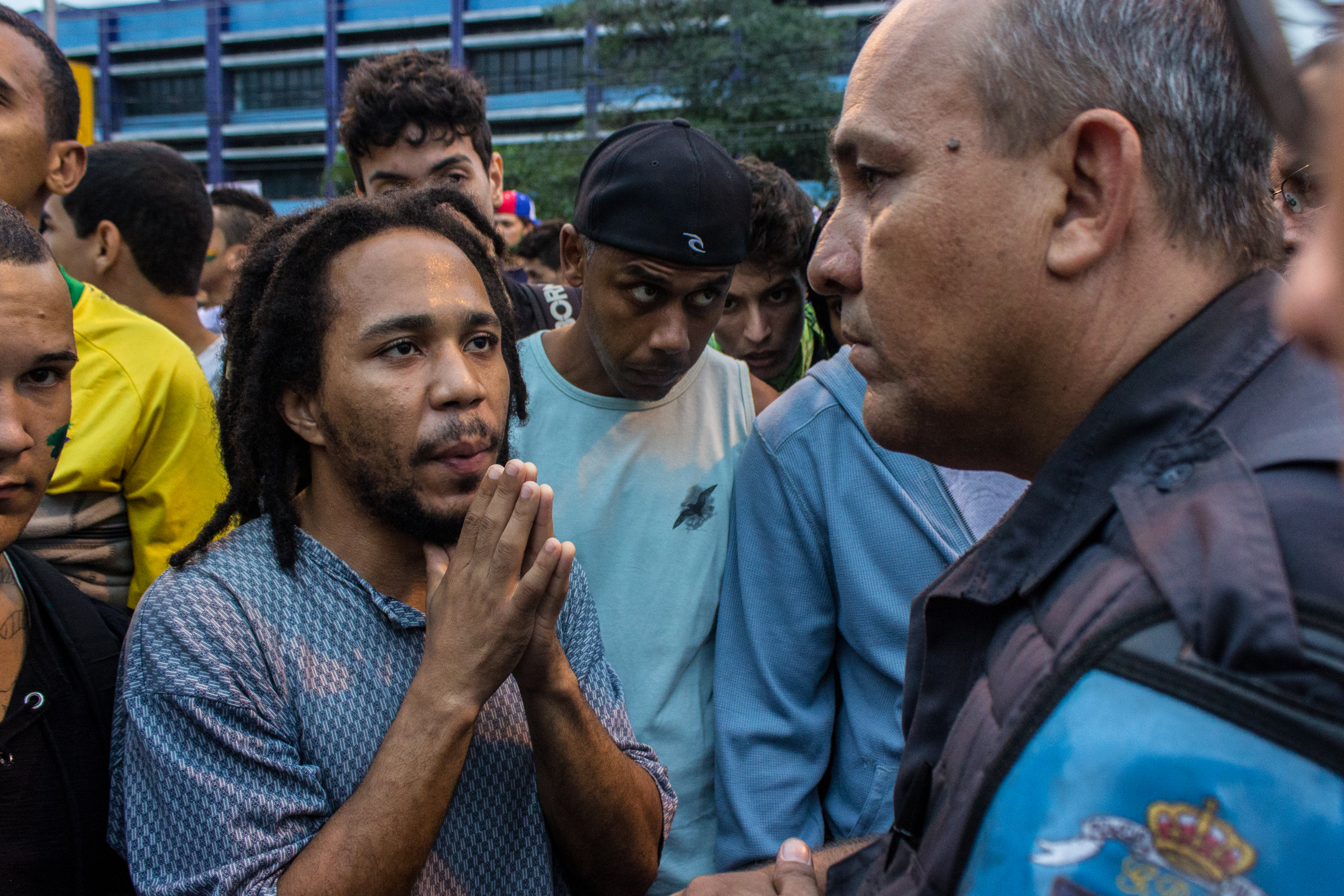 Manifestação no Bairro de Campo Grande, no Rio de Janeiro